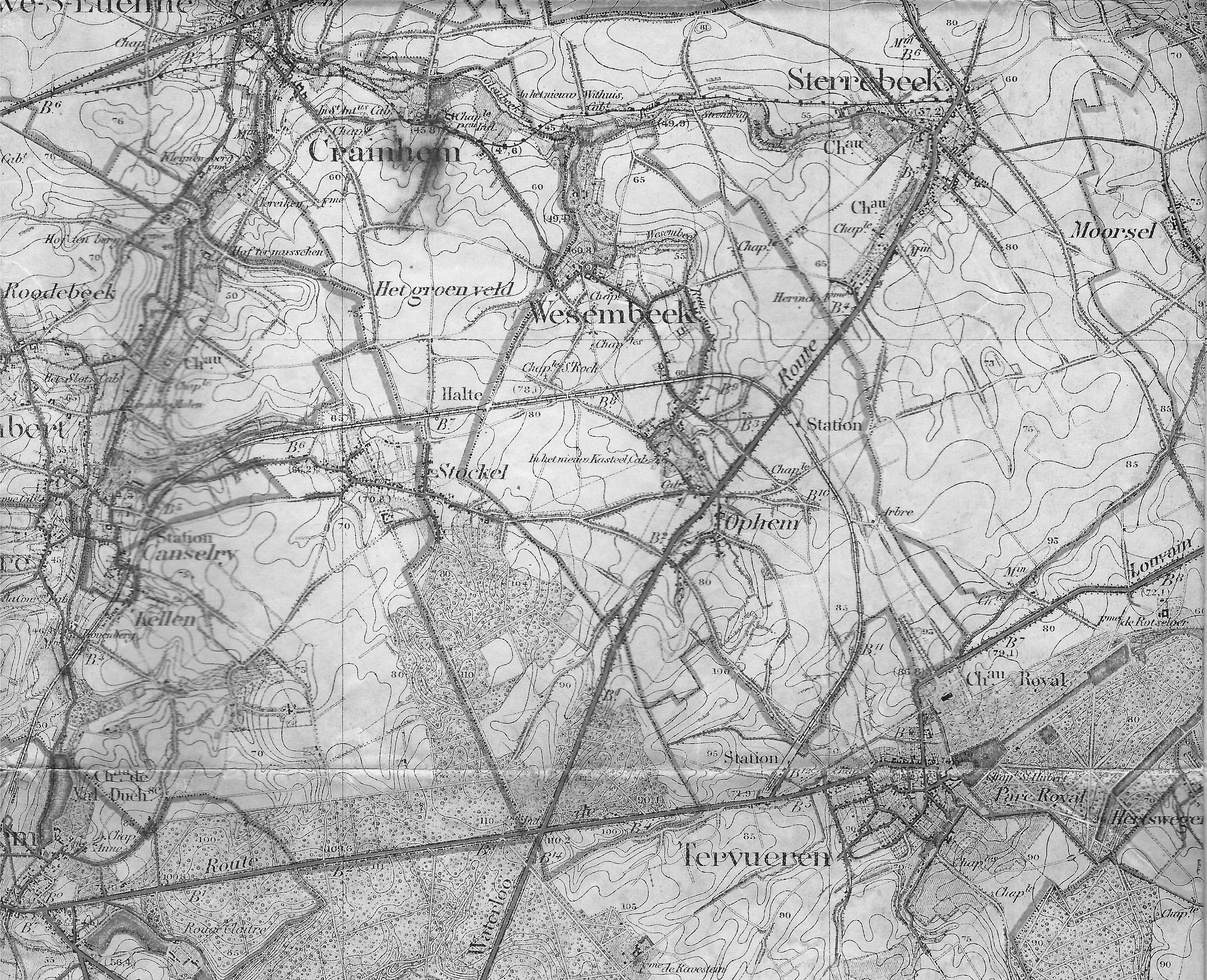 Deel van een stafkaart in het Oosten van het Brussels gebied. Toont de buurtspoorweg tot Sterrebeek en de spoorlijn naar Tervuren met het oorspronkelijk eindpunt in Tervuren.